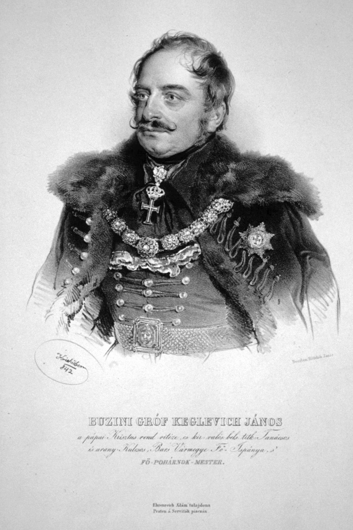 János Keglevich von Buzin, Graf (1786-1856), k. k. Kämmerer, Geheimrat.